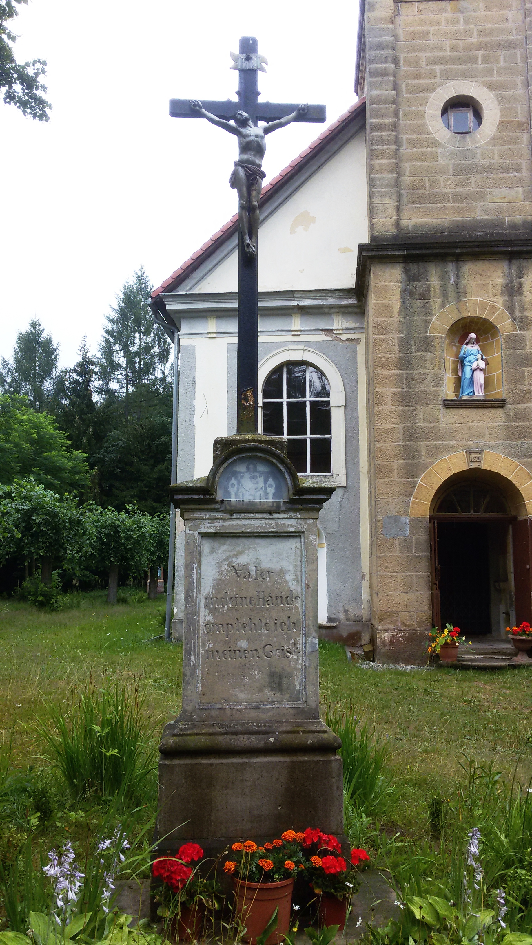 Kaplica św. Anny na Rogu w Zaworach k/Chełmska Śl.